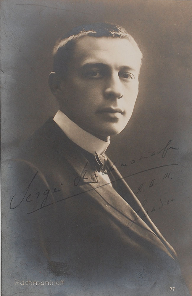 Sergei Rachmaninoff